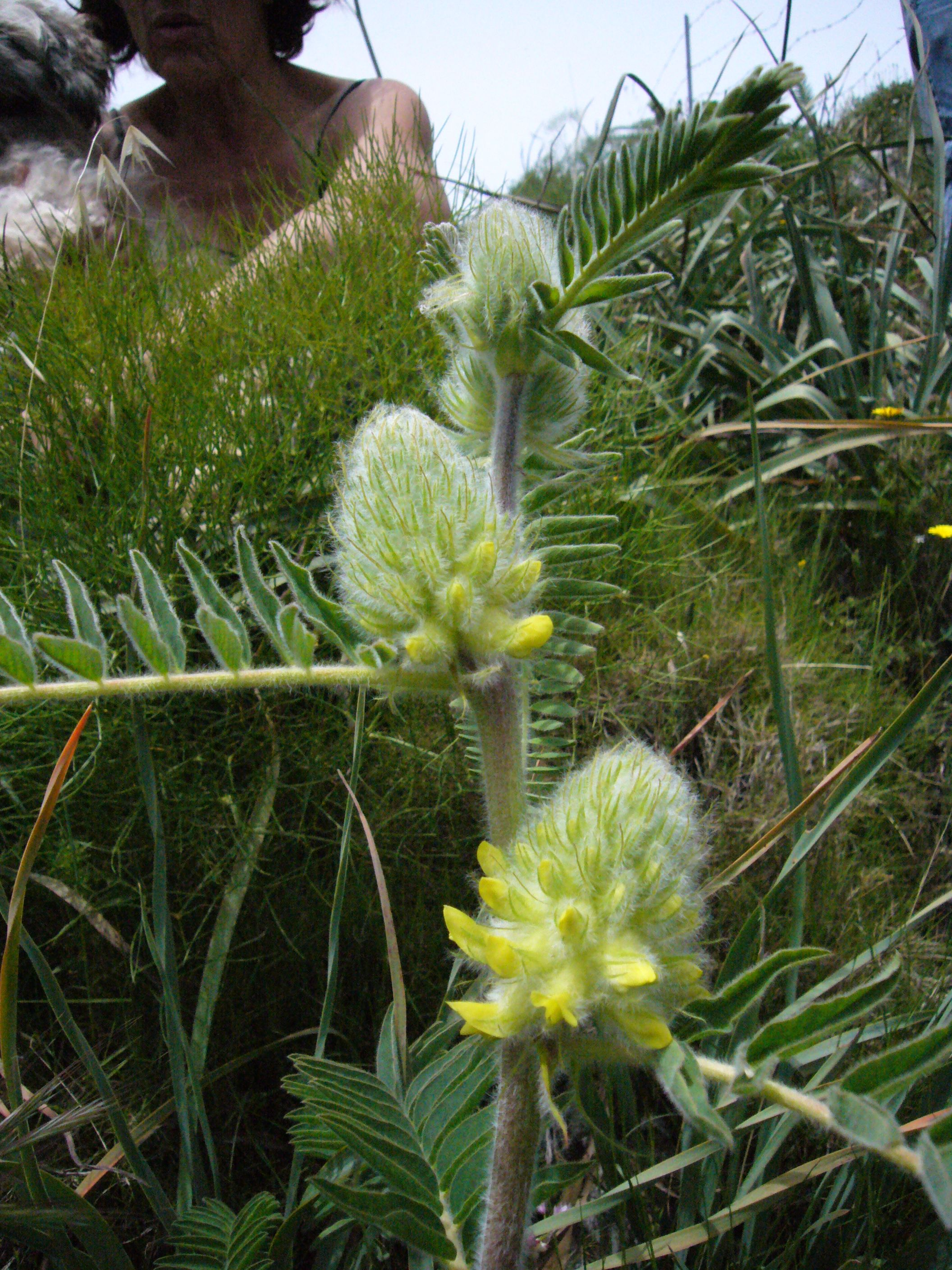 Astragale, queue de renard photographiée à Focicchia, dans le Site d'Intérêt Communautaire « Massif du San Pedrone (Castagniccia) » Natura 2000, par l'association « Un Pas en Arrière, Deux Pas en Avant» d'Erbajolo.